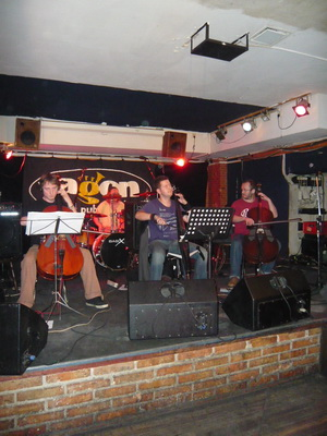 Čellisti ve Vagonu 2010